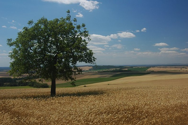 Chvojnica Hills near Unín